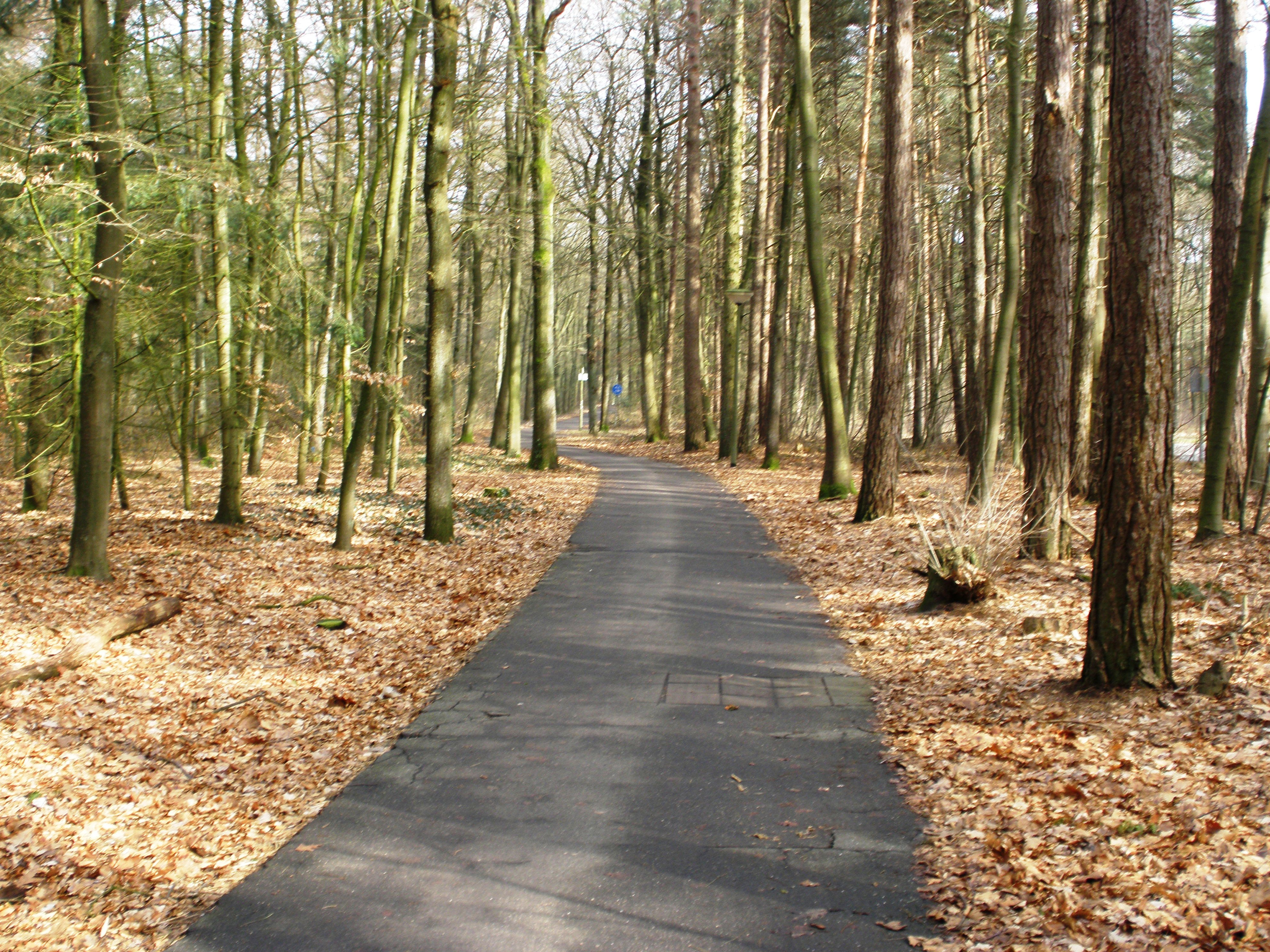 Fietspad parallel aan de Houtweg in de wijk Emmerhout van Emmen.